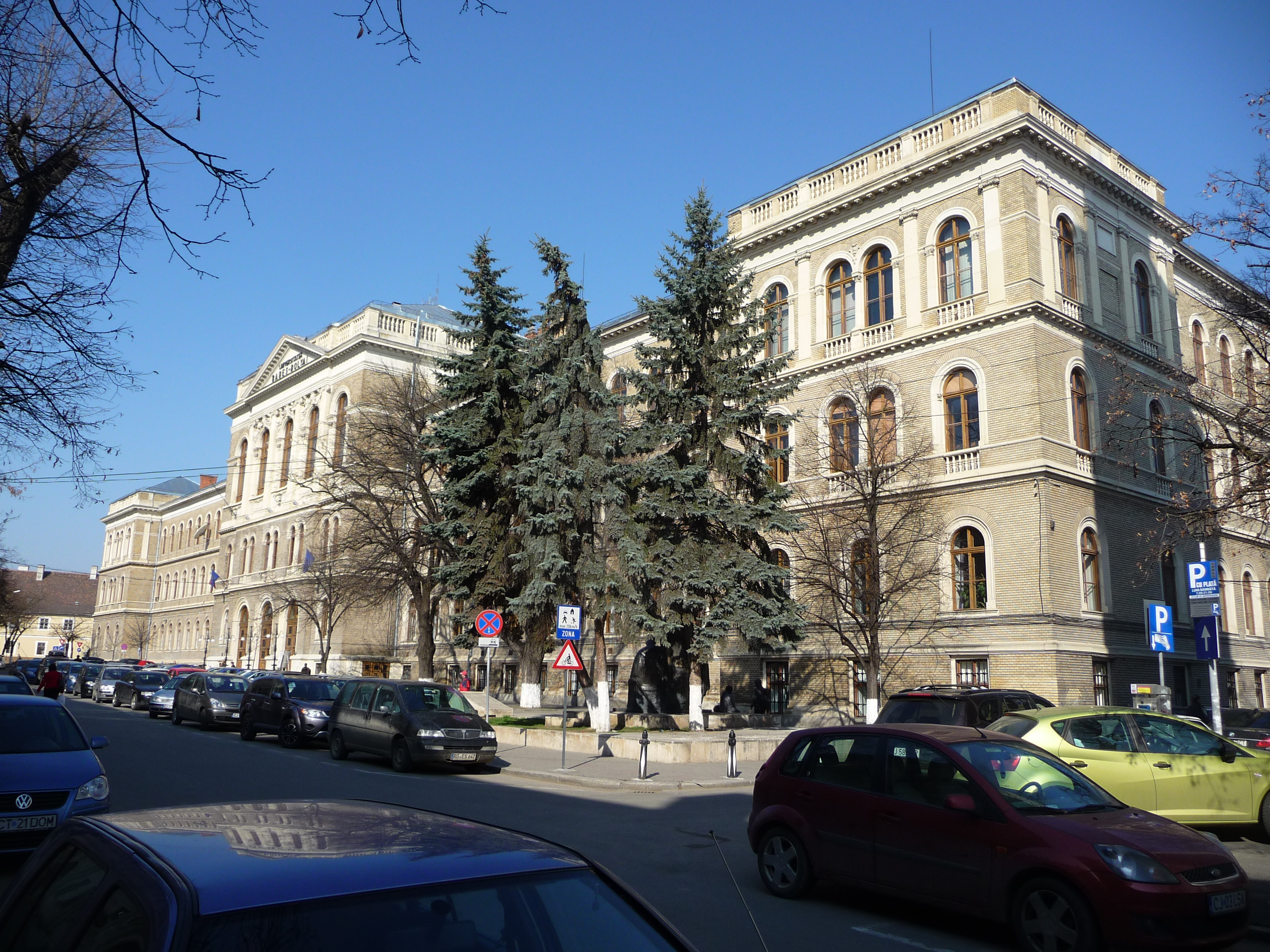 A Babeş–Bolyai Tudományegyetem főépülete Kolozsváron